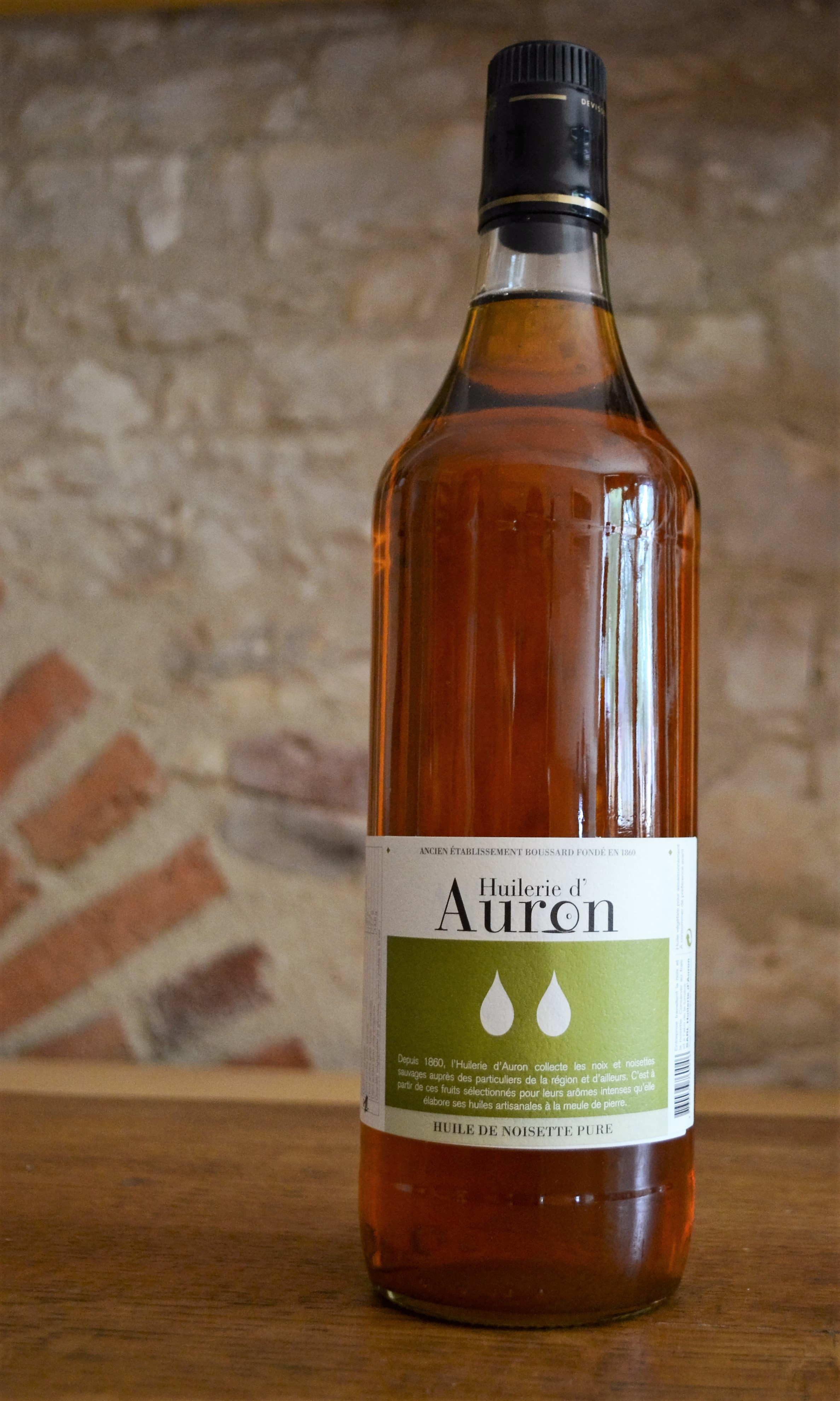 Huile de noisette issue de fabrication artisanale depuis 1860, par l'Huilerie d'Auron.